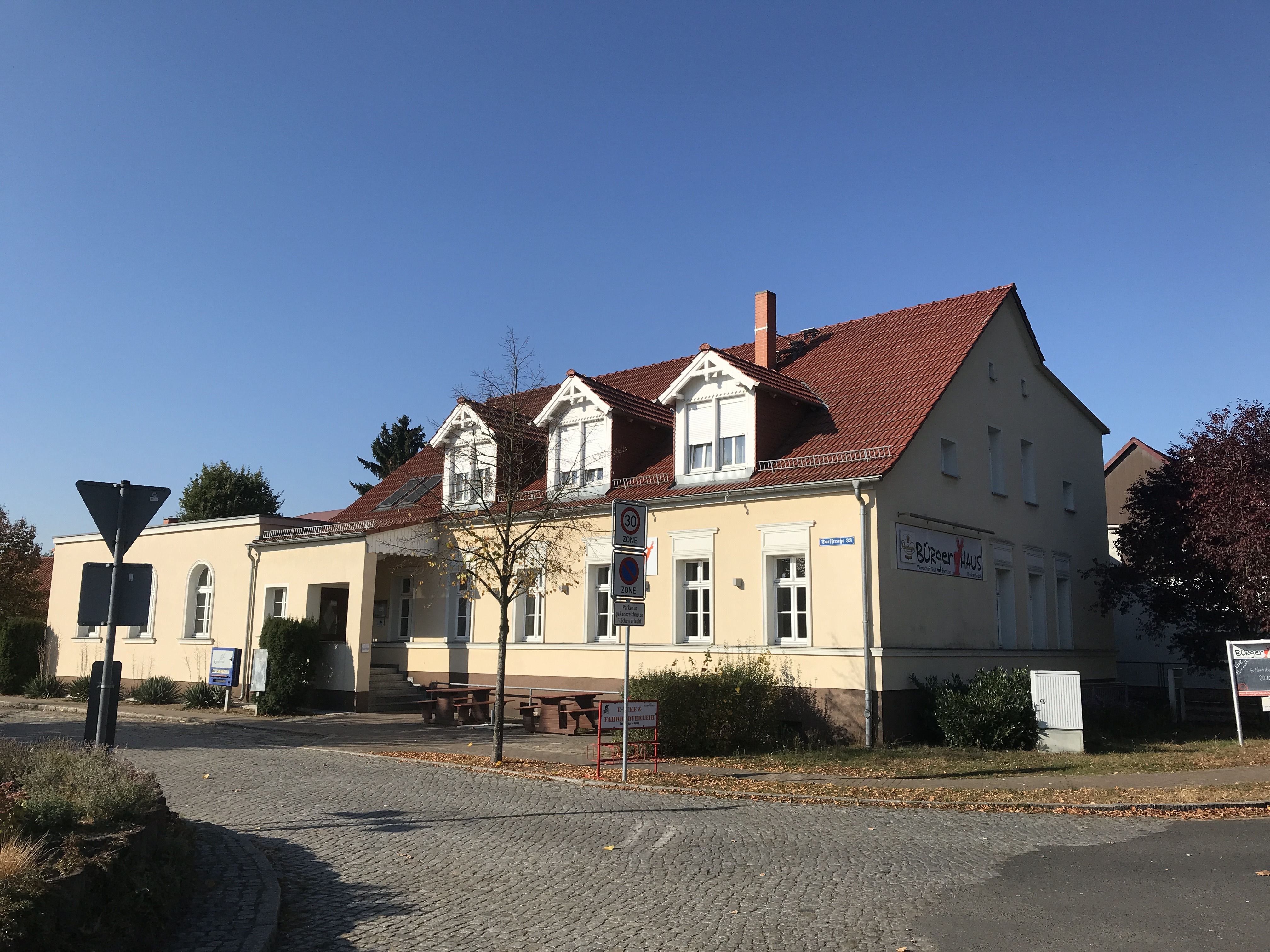 Berkenbrück, eine Gemeinde im Landkreis Oder-Spree im Land Brandenburg